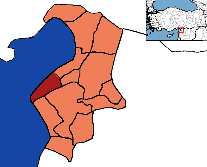 Hatay ilçeler haritası.